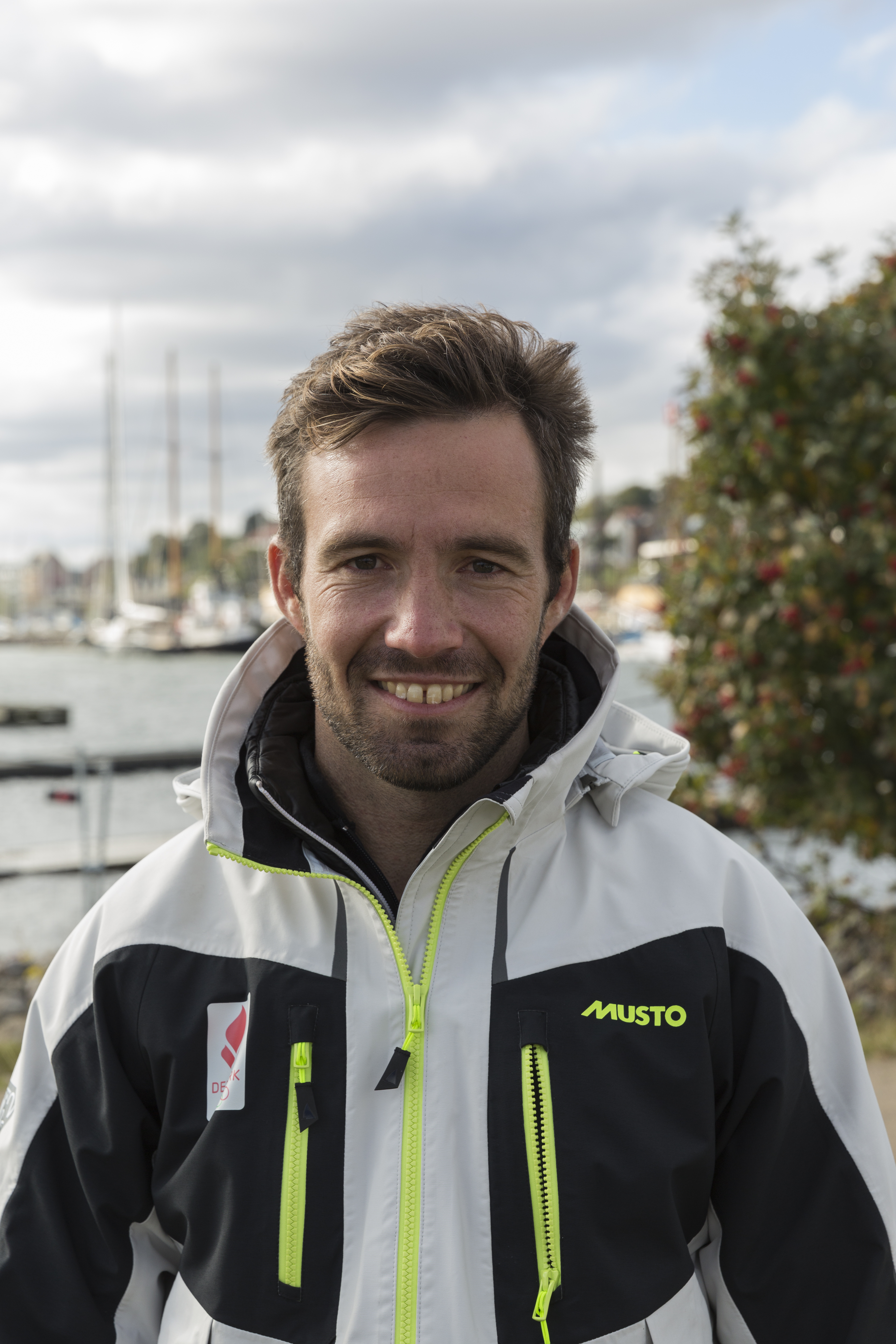 Jonas Warrer